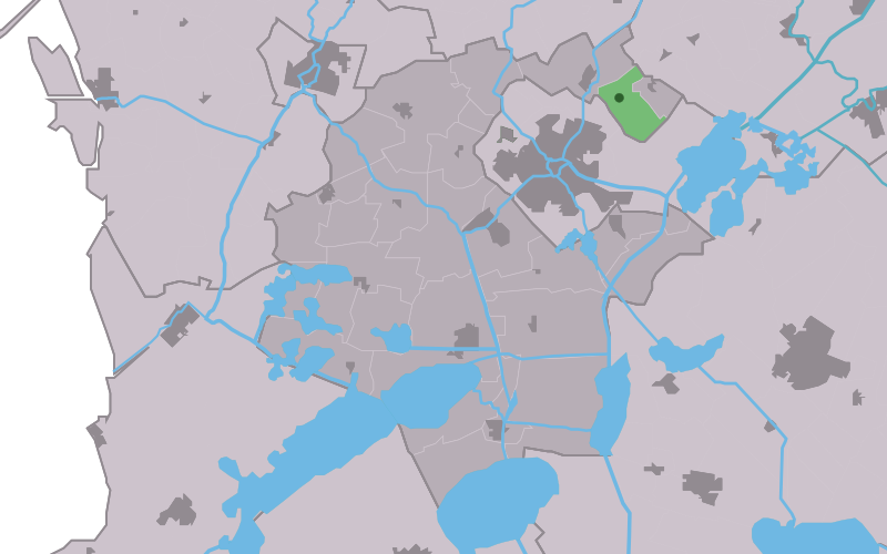 Kaartsje fan himrik fan Goaiïngea